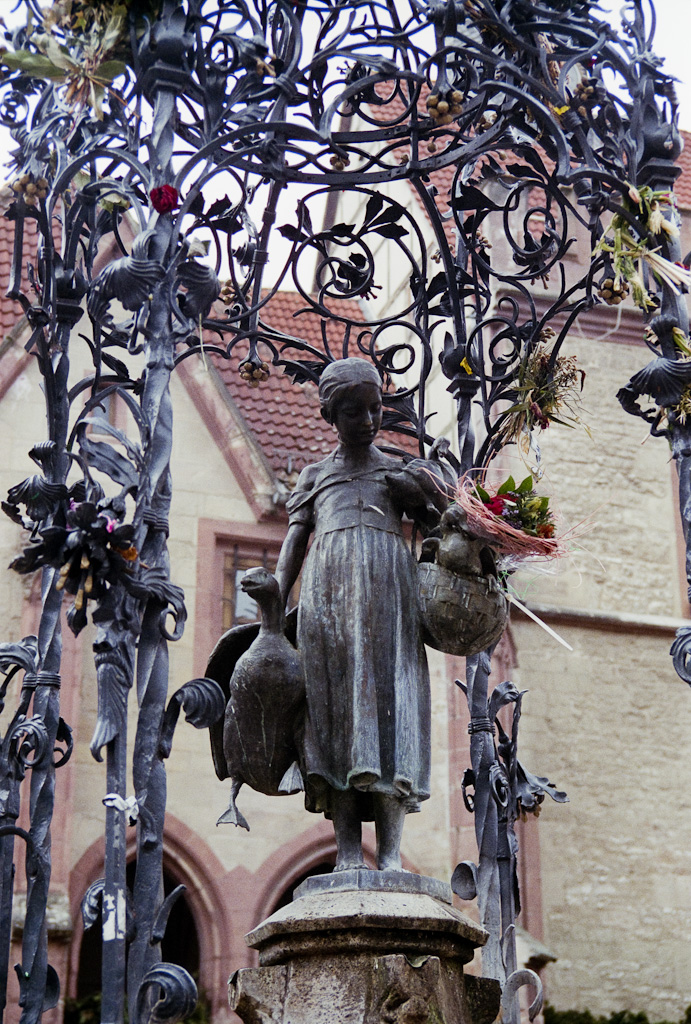 Gänseliesel Fotograf: Christoph Alexander Martsch Canon T70 (35mm), Tokina 35-70mm f/3.5, Rossmann HR 400 entwickelt bei Rossmann Fotoservice.